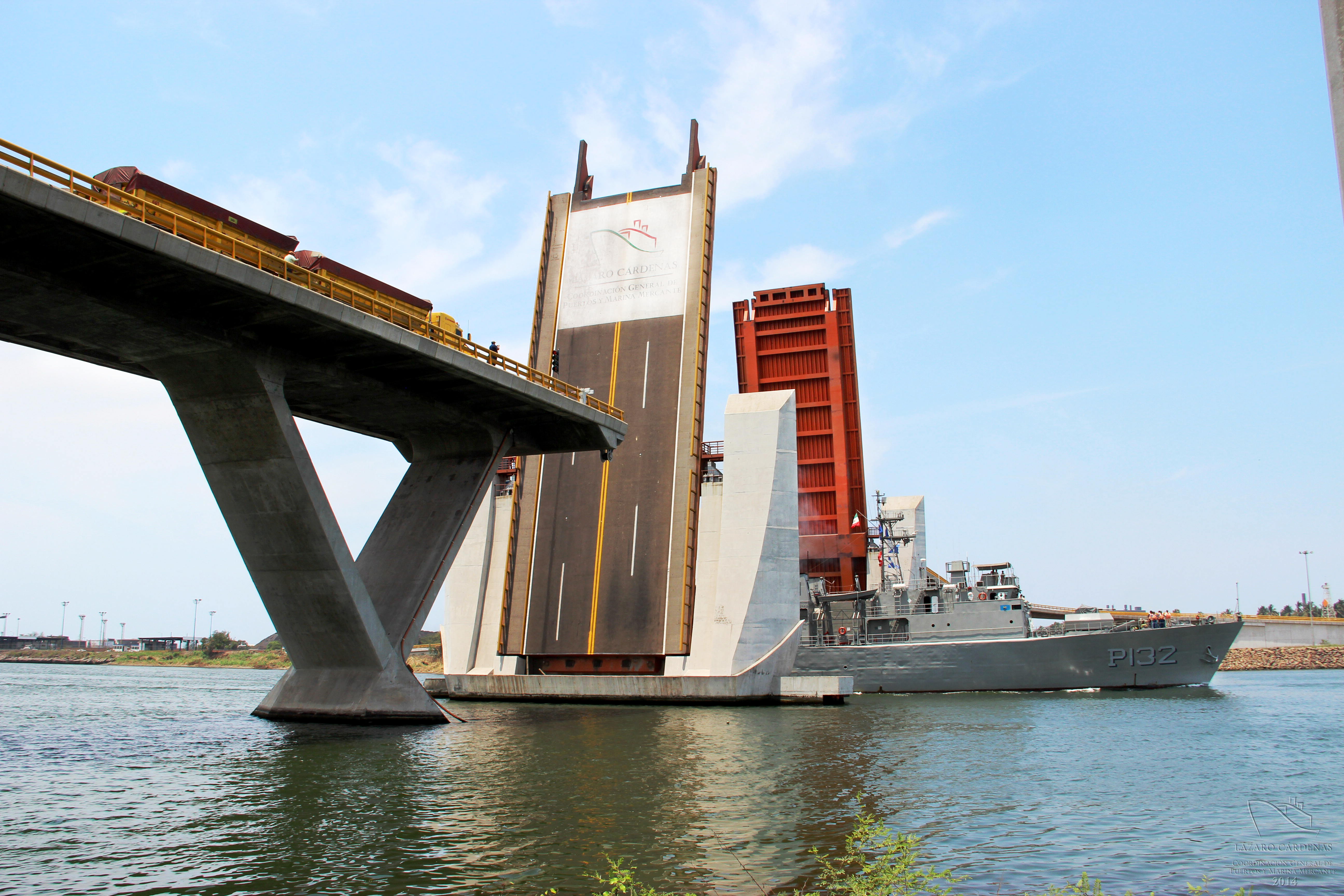 Puente Basculante "Albatros" en el Puerto Lázaro Cárdenas, Michoacán, México